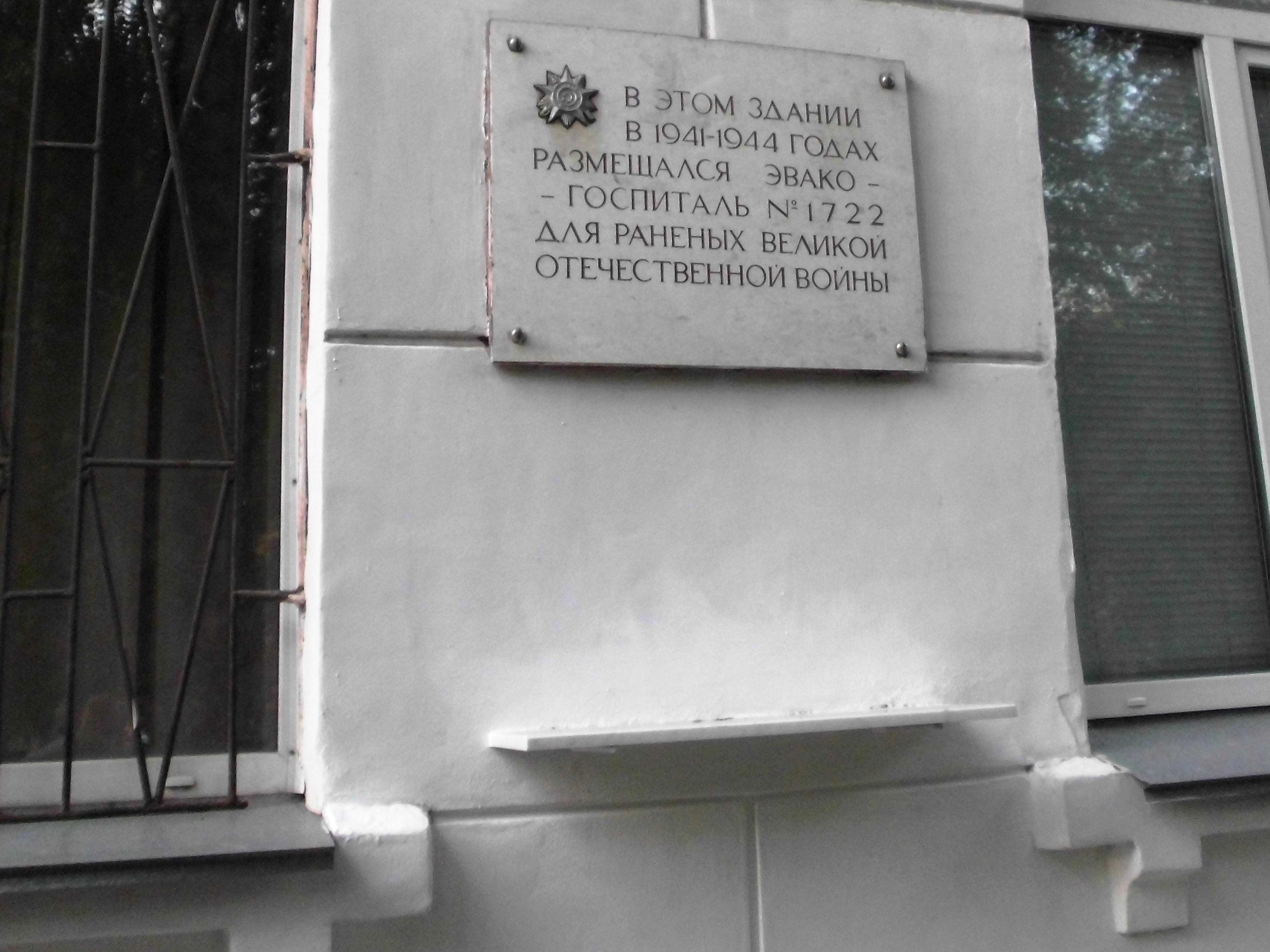 Челябинский государственный институт культуры: улица Орджоникидзе, 36-а, Челябинск, Челябинская область. Учебный корпус № 2 (Институт дополнительного профессионального образования).